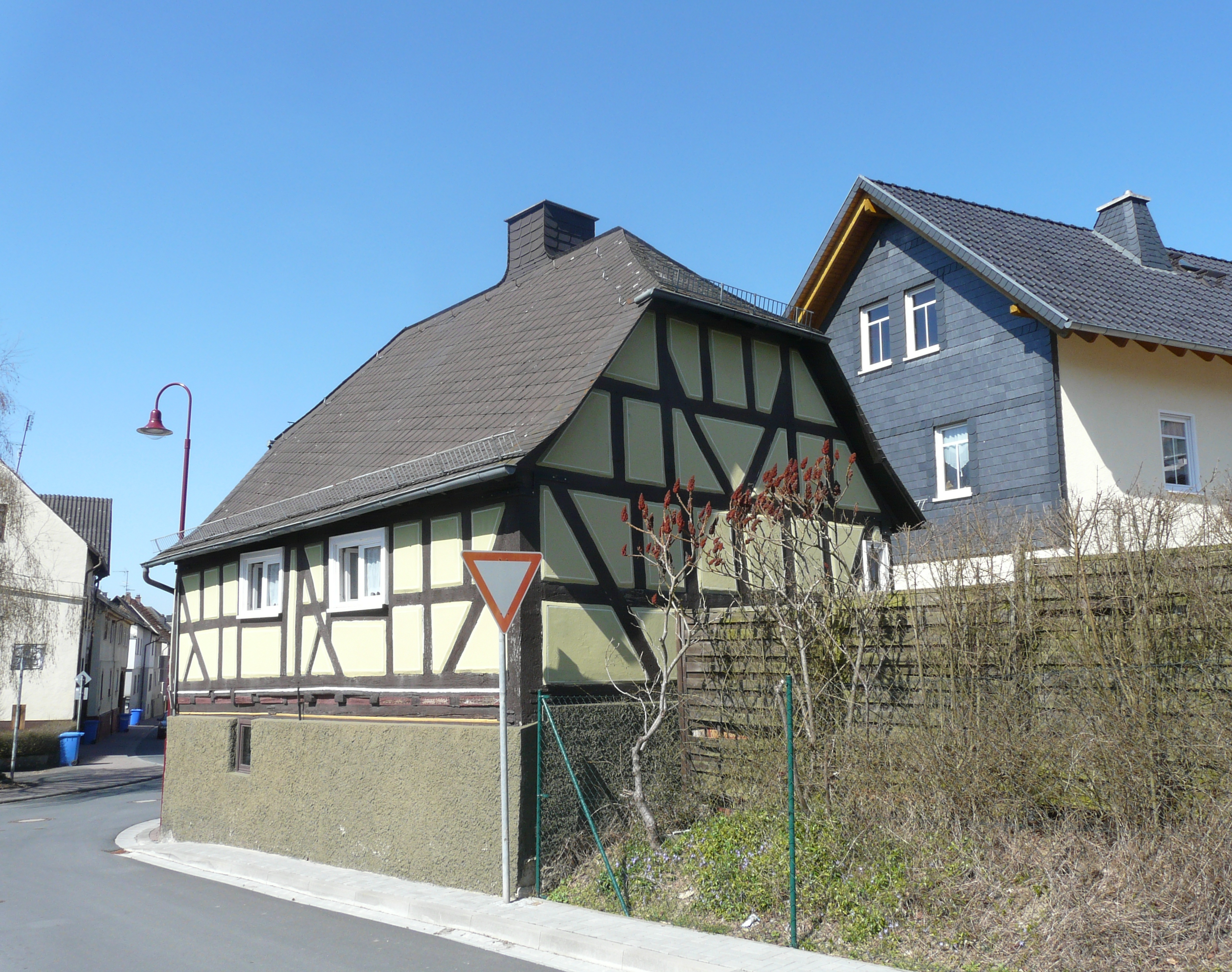 Backhaus in Schöffengrund-Oberwetz, Rheinfelser Straße 42